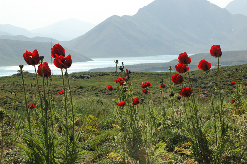 منظره آبگیر سد لار و شقایق های اطراف در ماه اردیبهشت